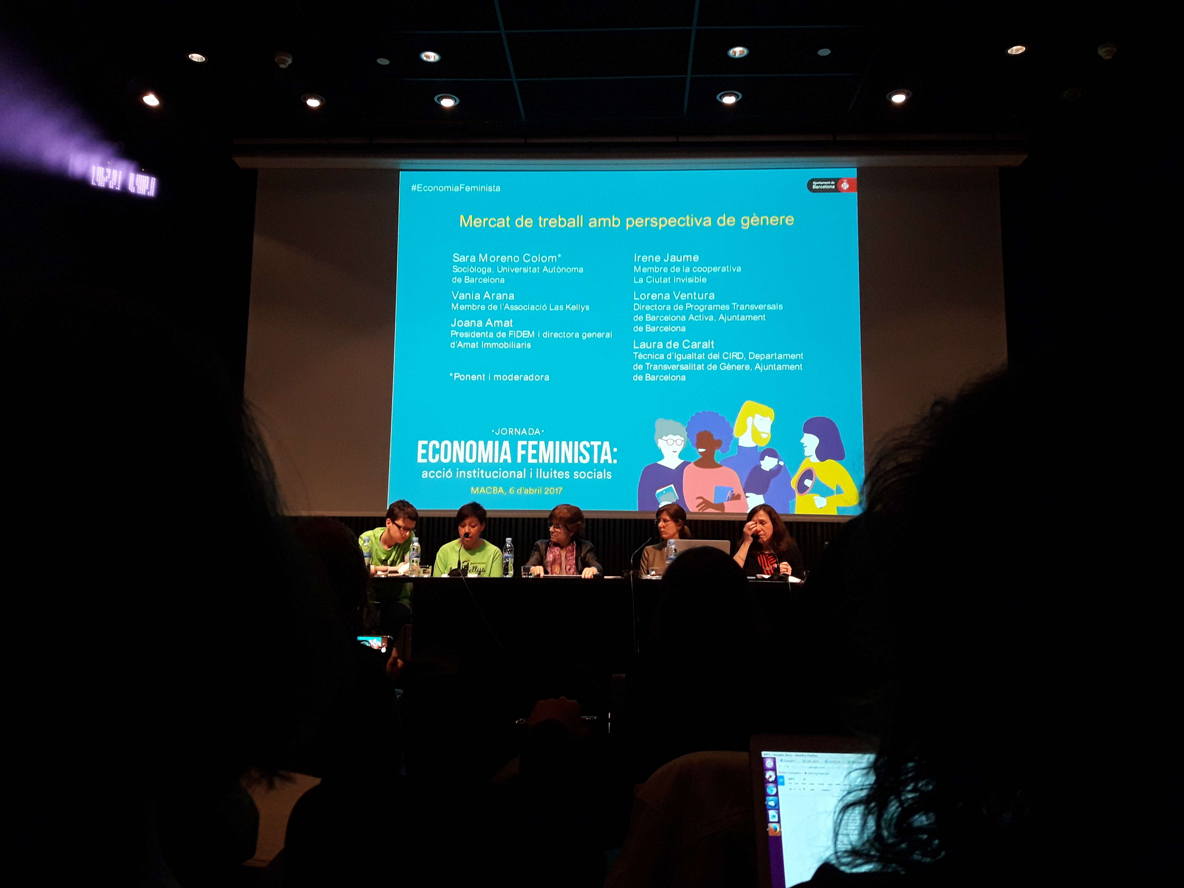 Mesa "mercado de trabajo con perspectiva de género", una de las mesas temáticas (fiscalidad, presupuestos, etc.) de la jornada de economía feminista de Barcelona del jueves 6 de abril de 2017, acontecidas en el MACBA. De izquierda a derecha, en verde, dos miembros de Las Kellys, Ana (a la derecha entre ellas dos) está hablando; Joana Amat, Laura de Caralt y Lorena Ventura.